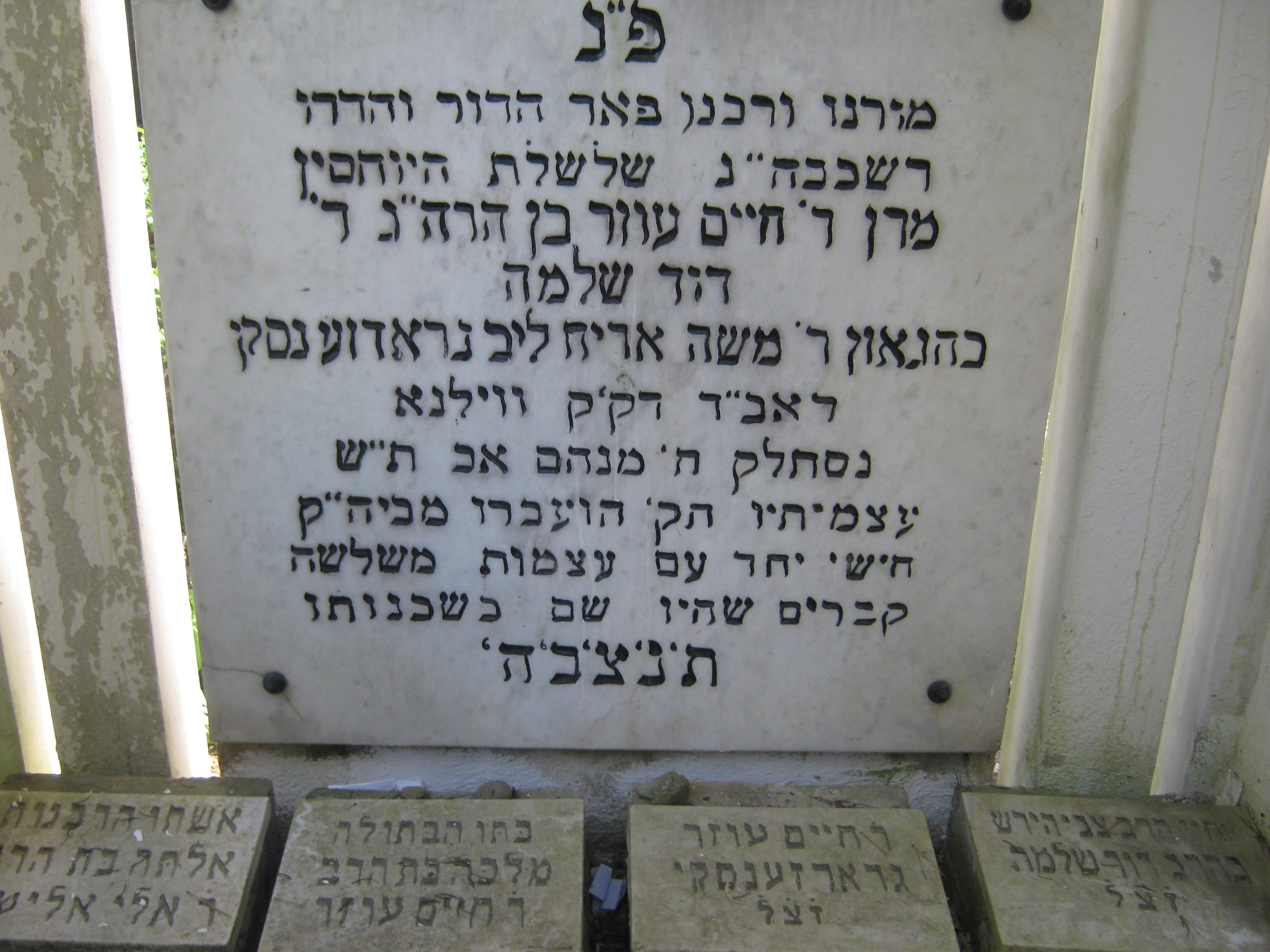 פנים האוהל של קבר רבי חיים עוזר גרודז'ינסקי, בו נראים גם מצבת אשתו בתו ואחיו